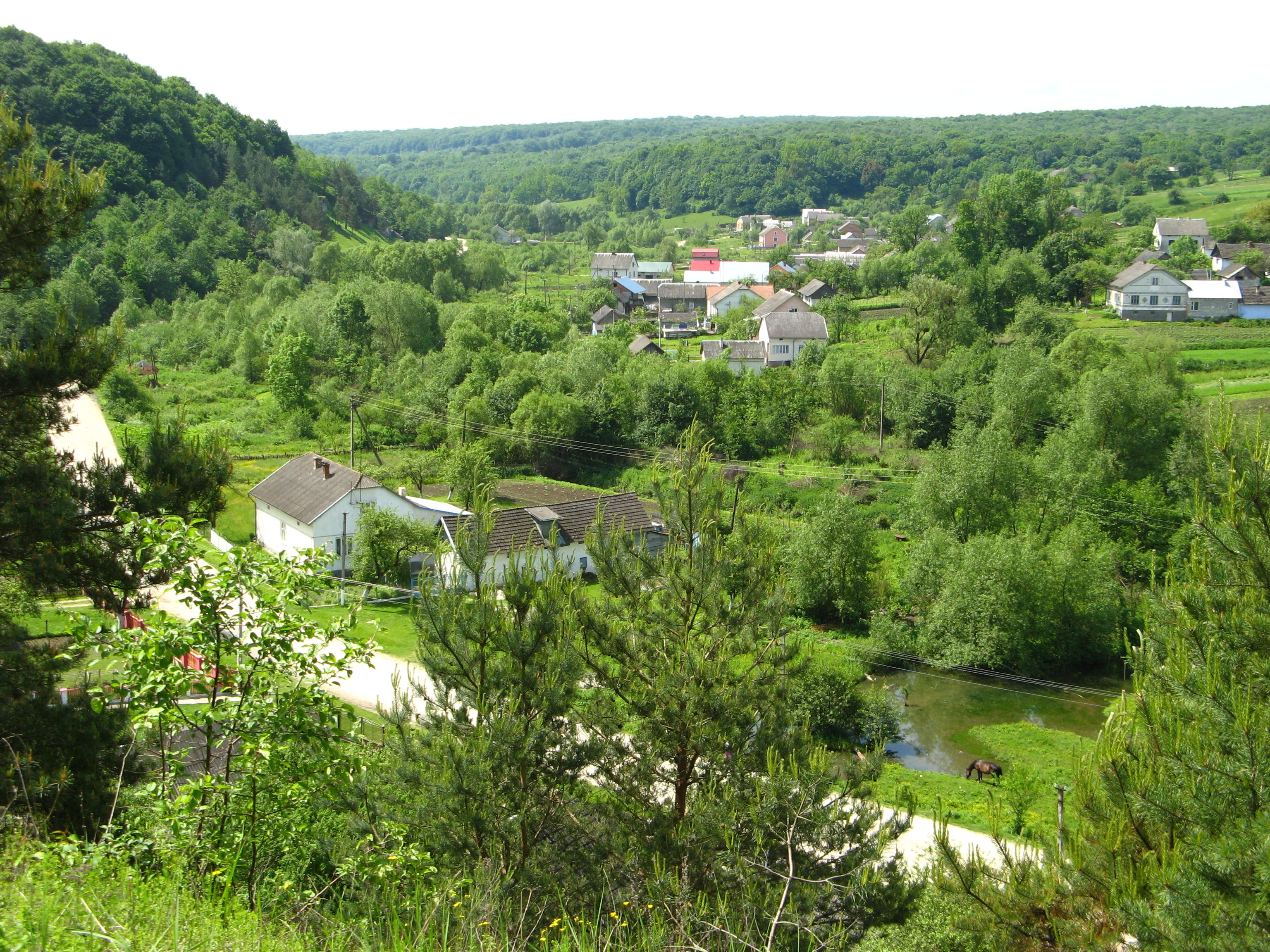 Kolodnycia.jpg: Колодниця